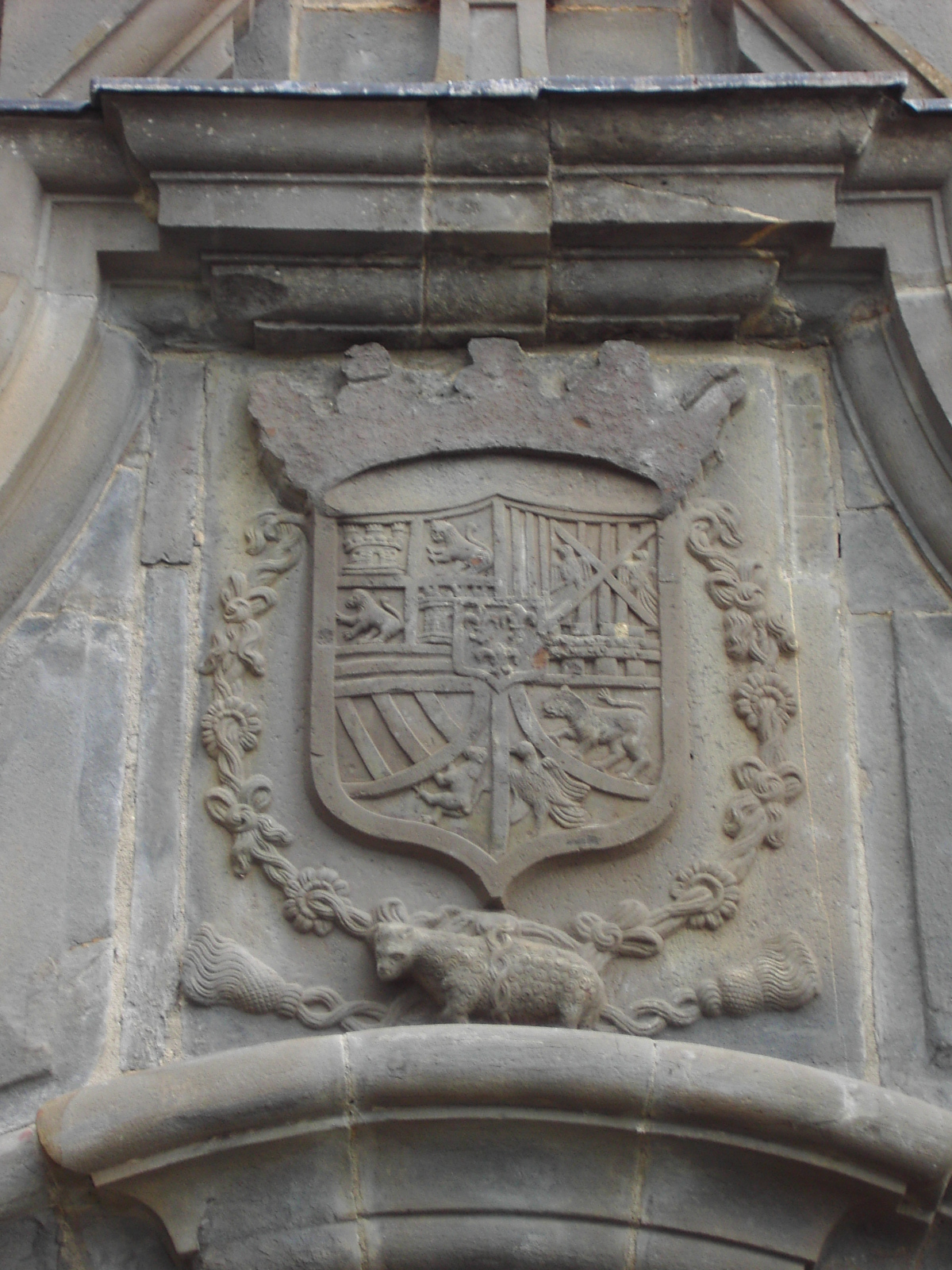 El escudo grabado en la fachada principal del monasterio de San Victorián (Huesca).